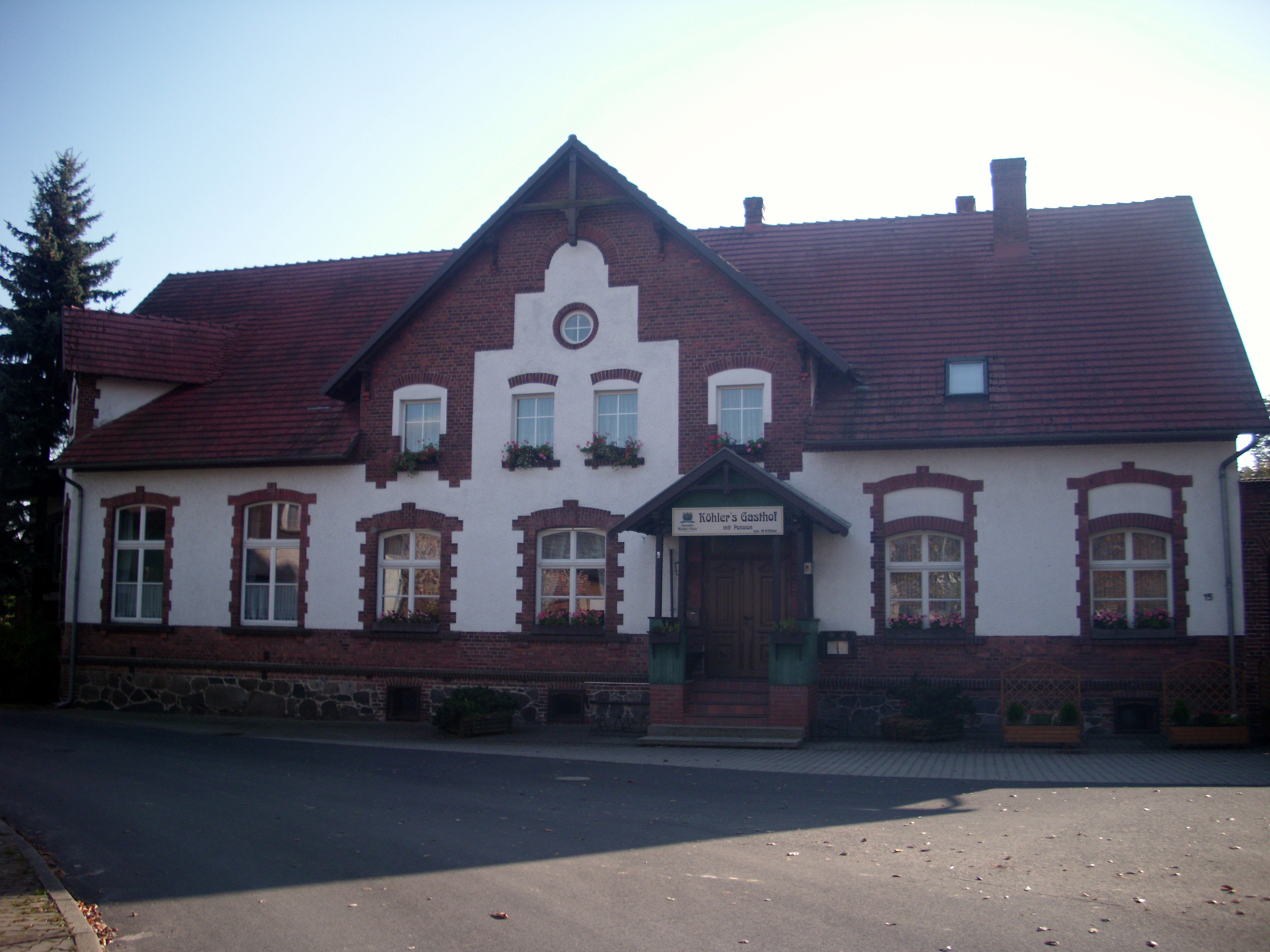 ehemaliger Krug, Treppeln, Naturpark Schlaubetal, Brandenburg